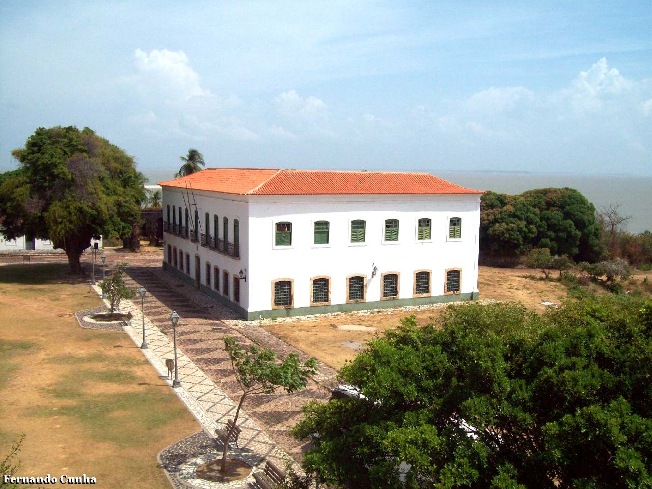 Prefeitura e Câmara Municipal de Alcântara Maranhão, Brasil.